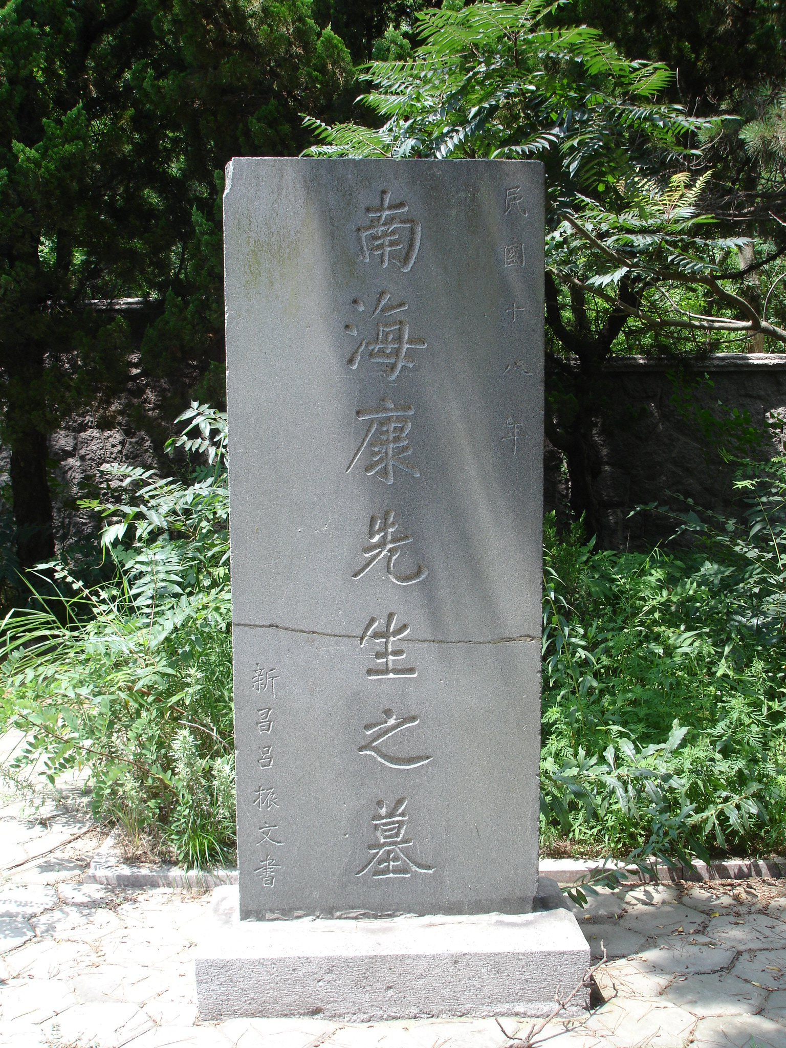 青岛康有为墓原碑